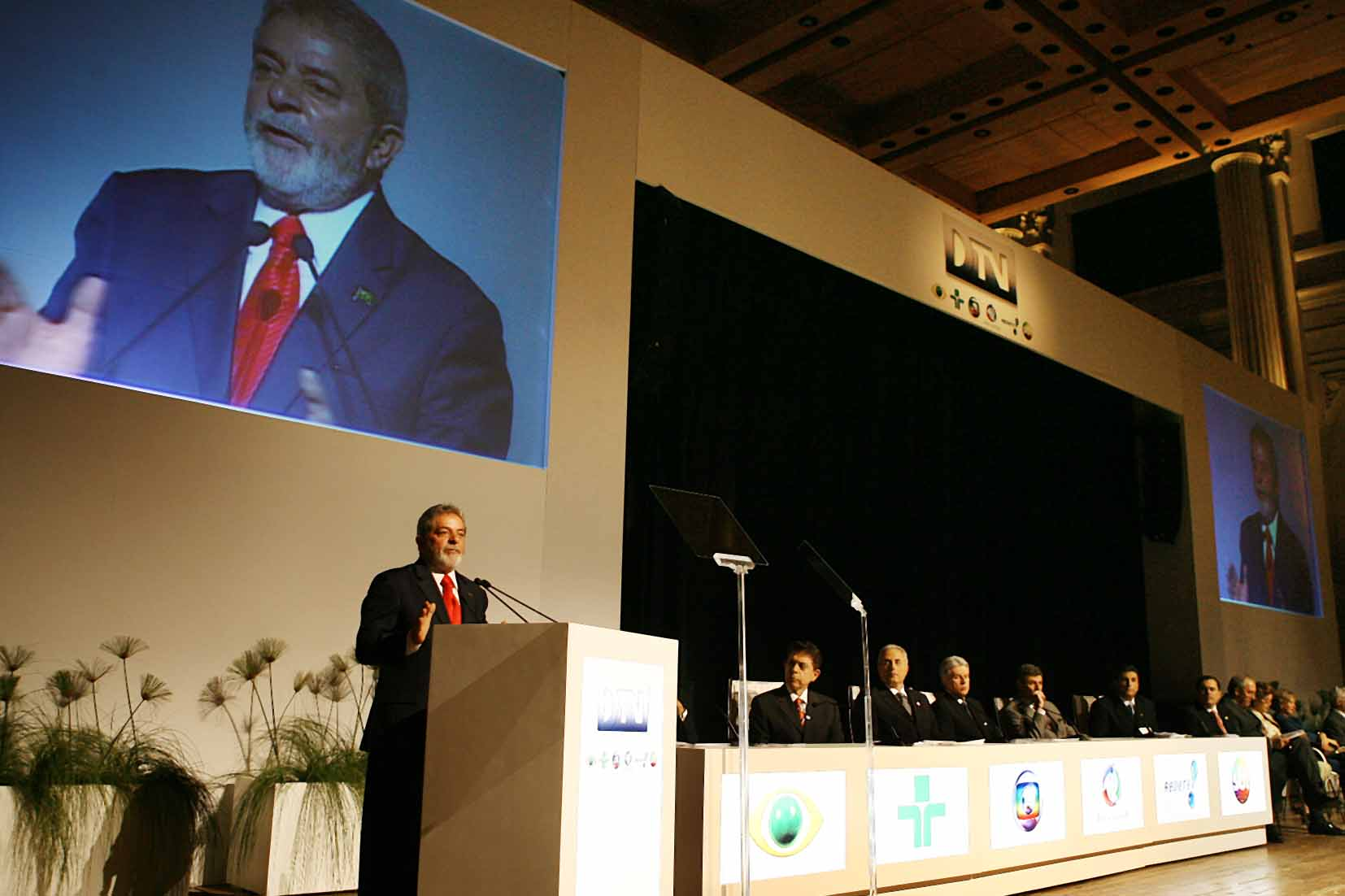 São Paulo - Presidente Lula participa da cerimônia que dá início às transmissões da TV digital